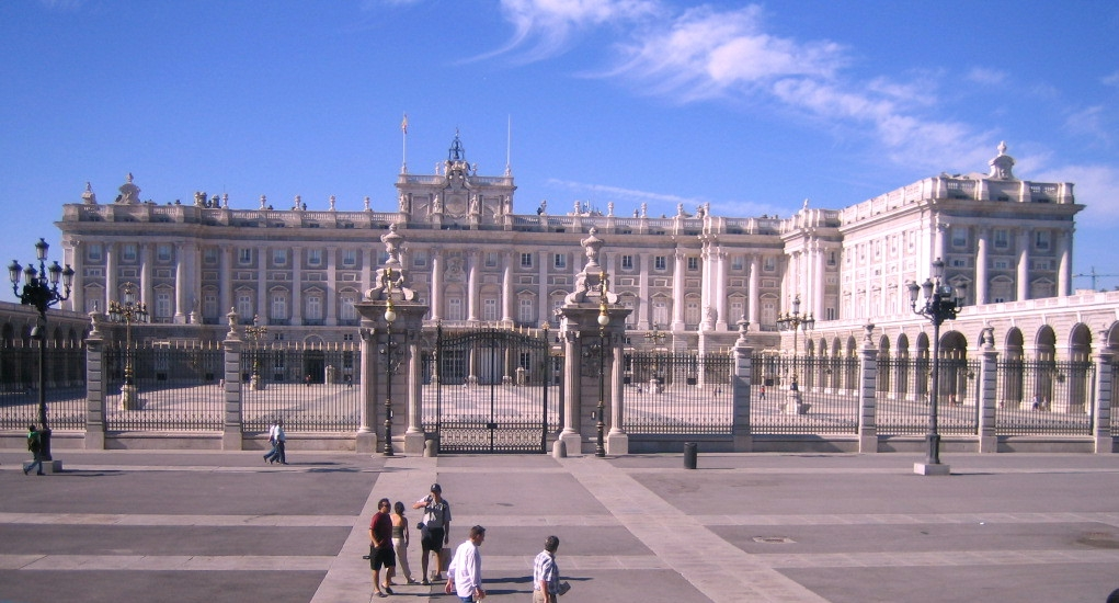 Palacio Real de Madrid. Fachada de la Plaza de la Armería.